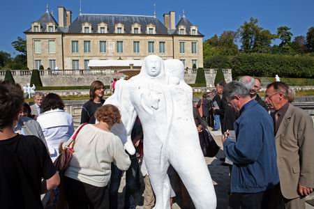 傅慶豊"百家姓"烙名行動 2008/年法國歐維耳市( 巴黎近郊 ), 於城堡美術館、當代藝術畫廊、杜比尼美術館花園、公園等地進行百傅慶豊家姓烙名行動及藝術創作展示。